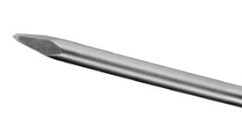 fotografie oškrtu